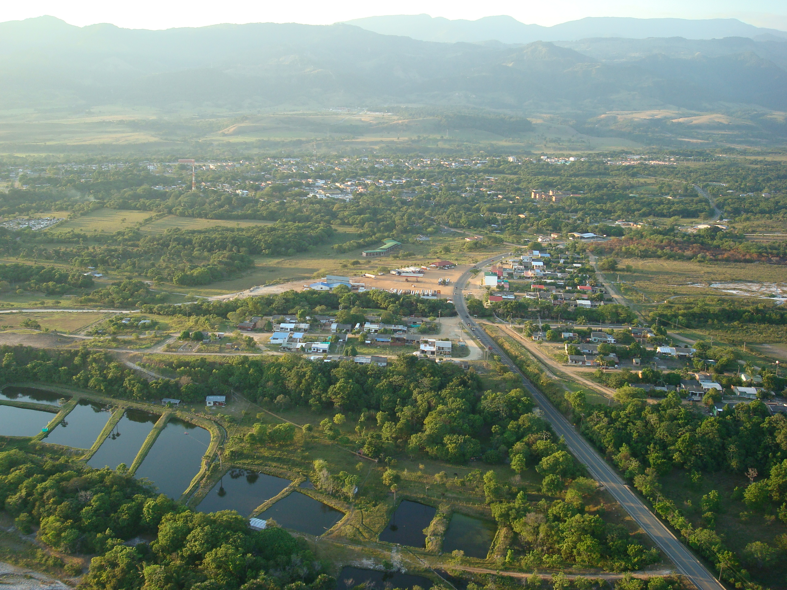 Panorámica de Monterrey